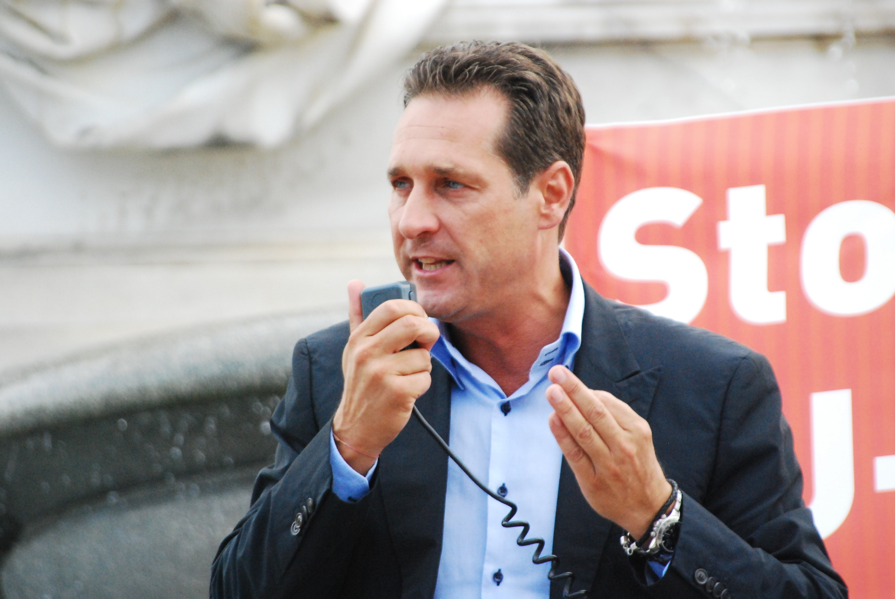 Heinz-Christian Strache bei einer Kundgebung vor dem Parlament in Wien